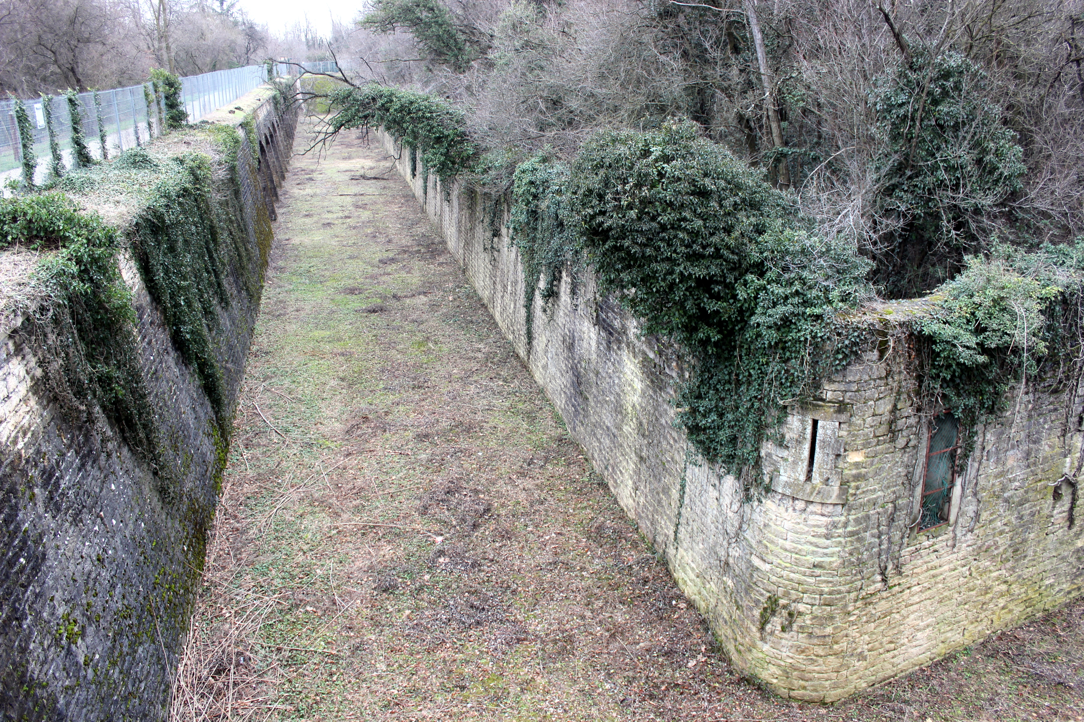 Angle sud-ouest du chemin de ronde du fort de Bron. - vue sur le fossé menant à l'entrée.